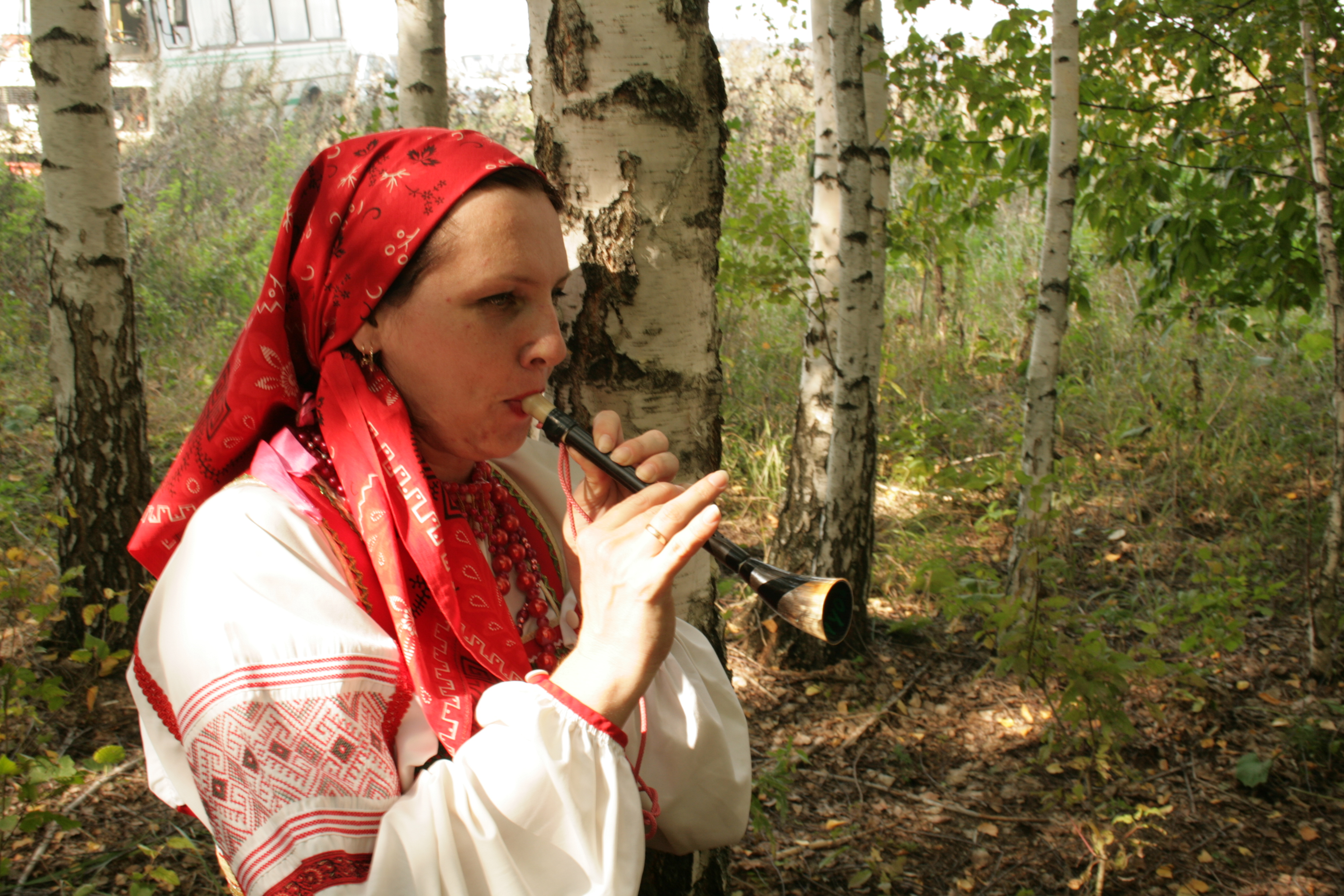 Открытие нового микрорайона родового экокопоселения «Кореньские родники». 15 сентября 2012 г. Белгородская область, Шебекинский район.